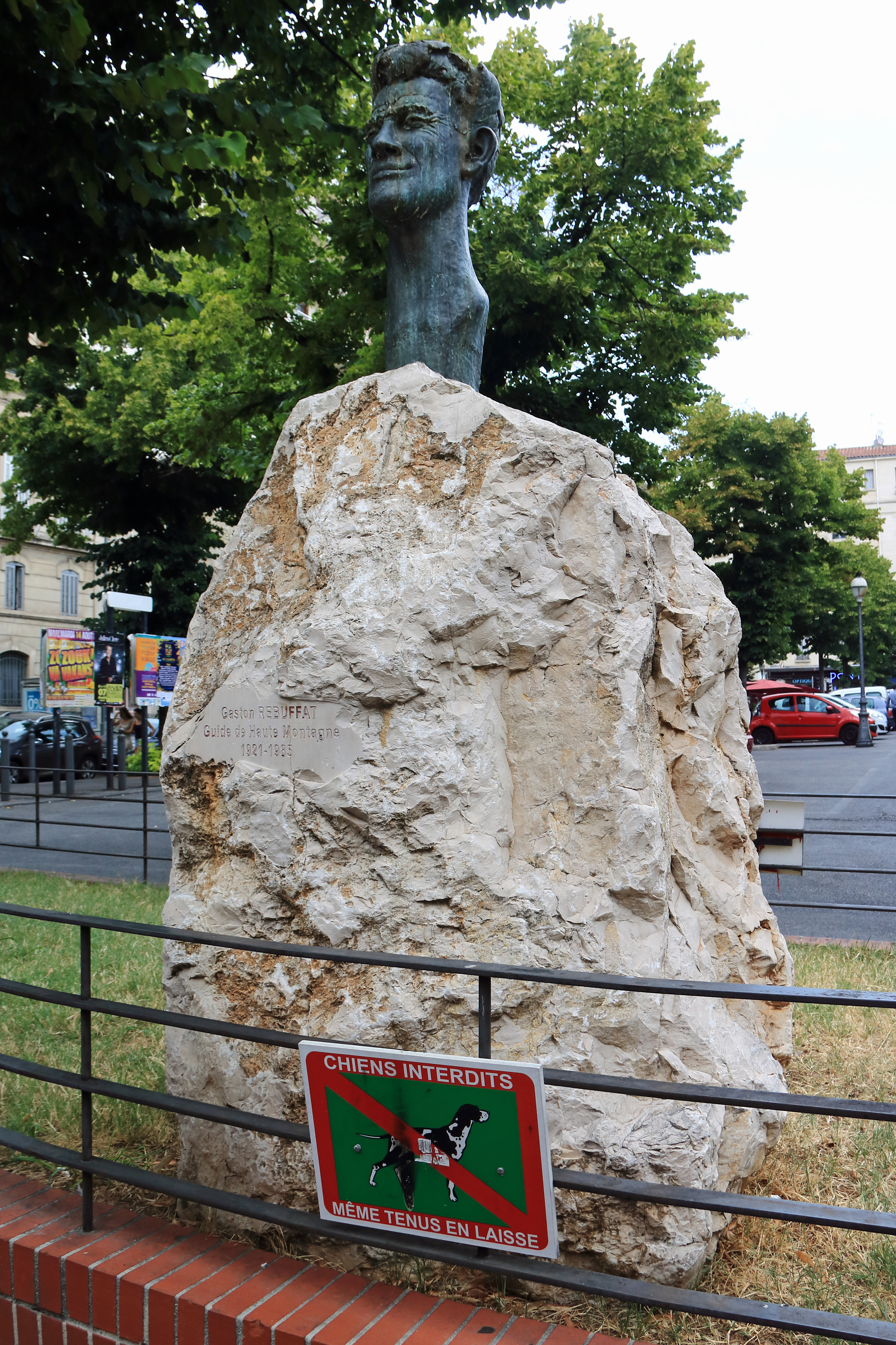 MARSEILLE - Buste de Gaston Rebuffat - Place Sébastopol